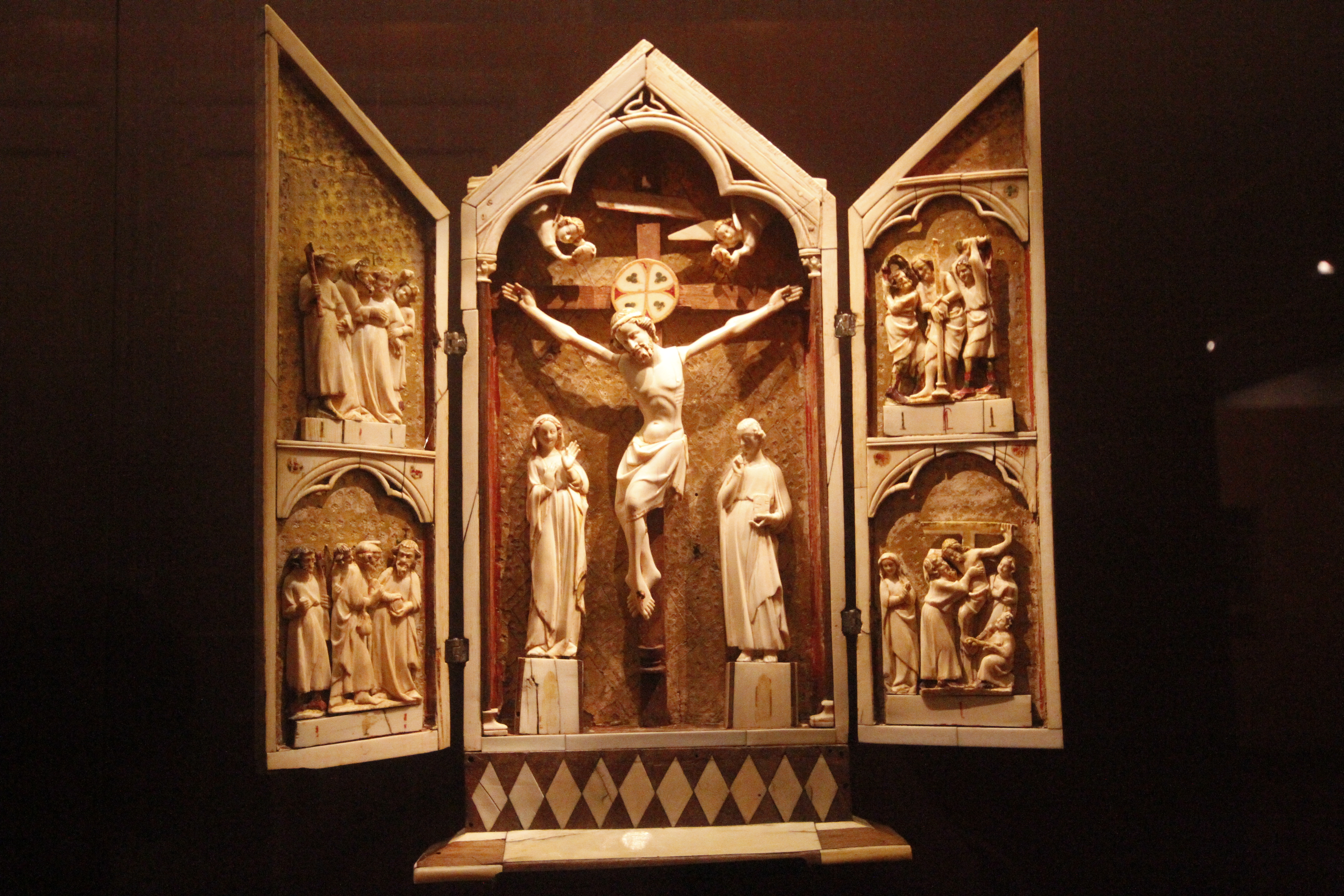 Crucificação